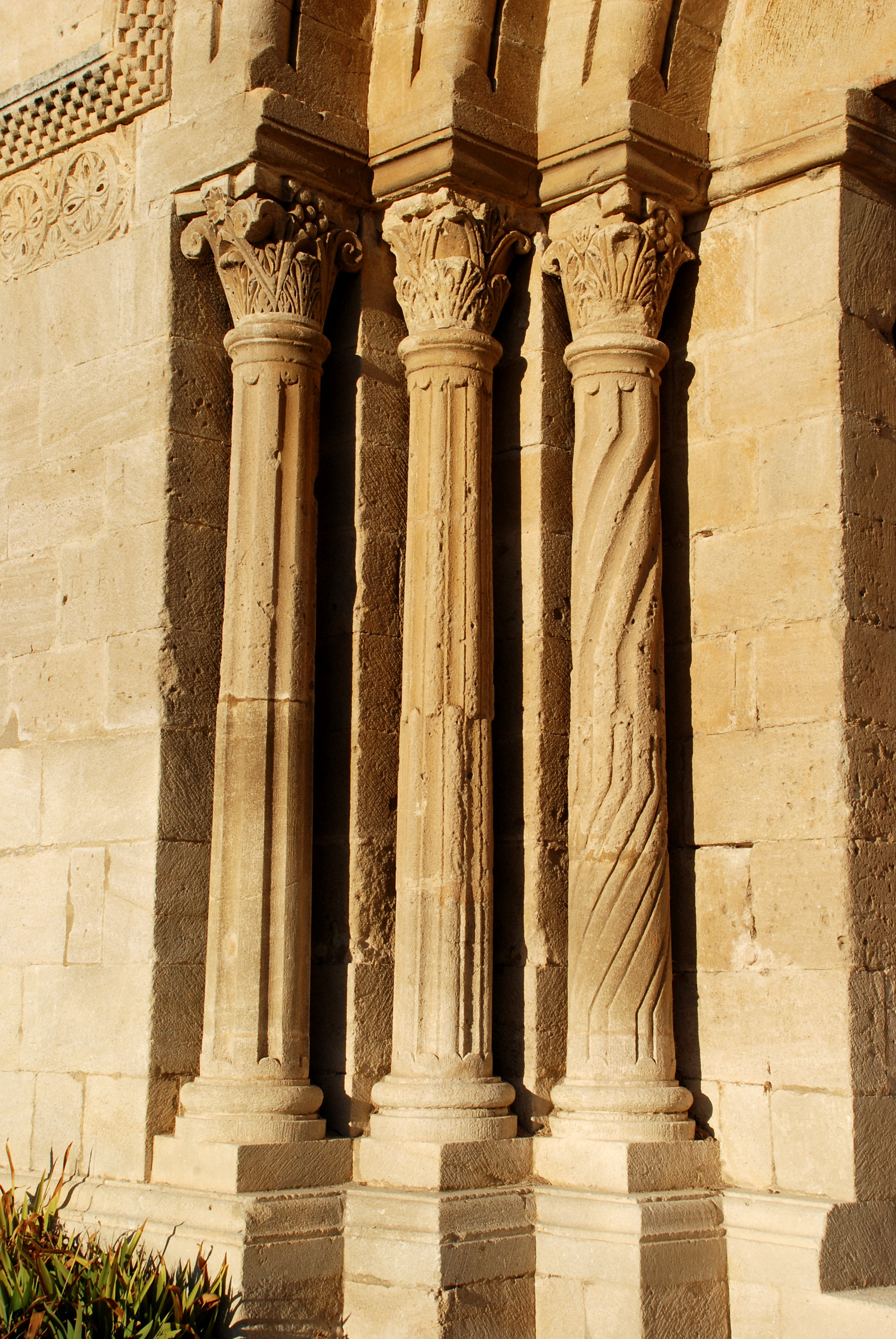 France - Provence - Prieuré Notre-Dame de Salagon